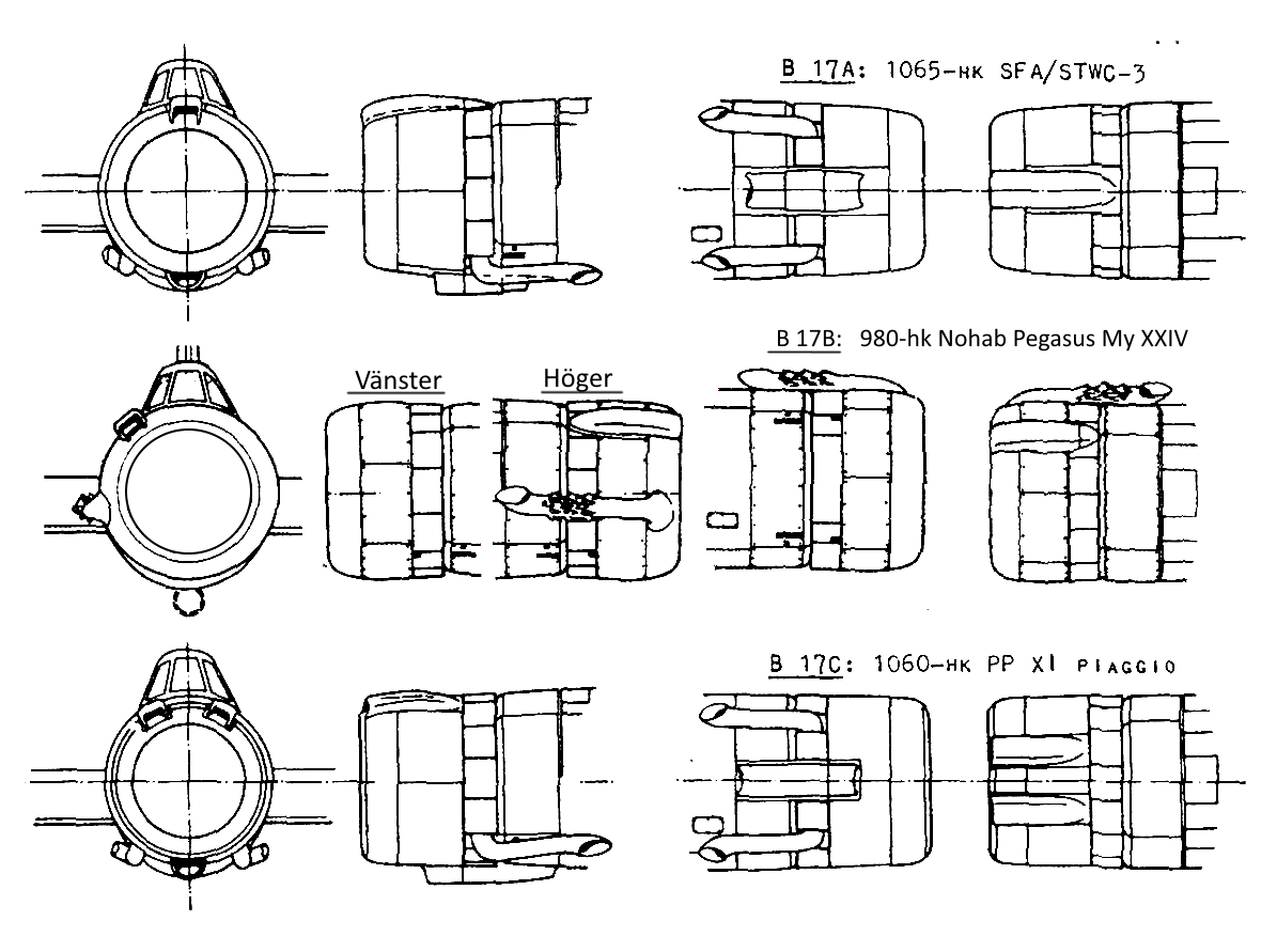 Saab 17s olika motorkåper